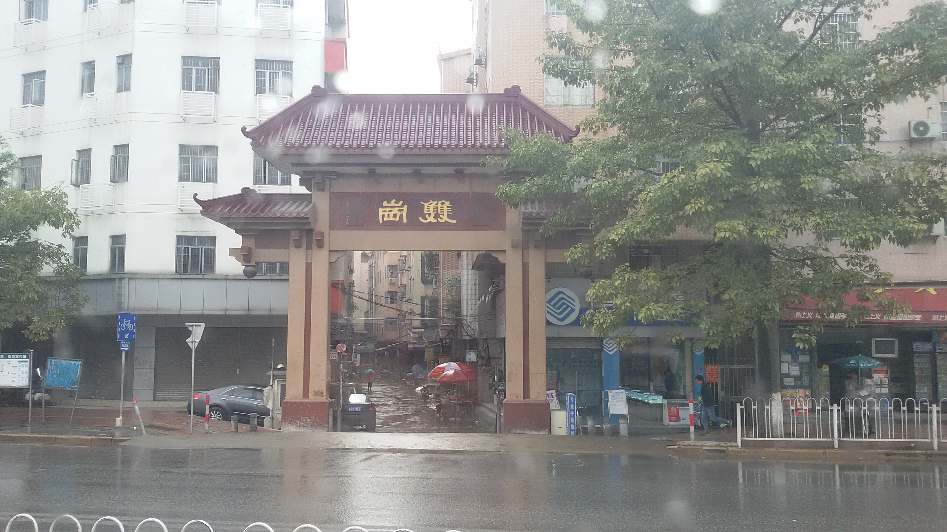 粵語: 䨇崗村嘅正門牌坊